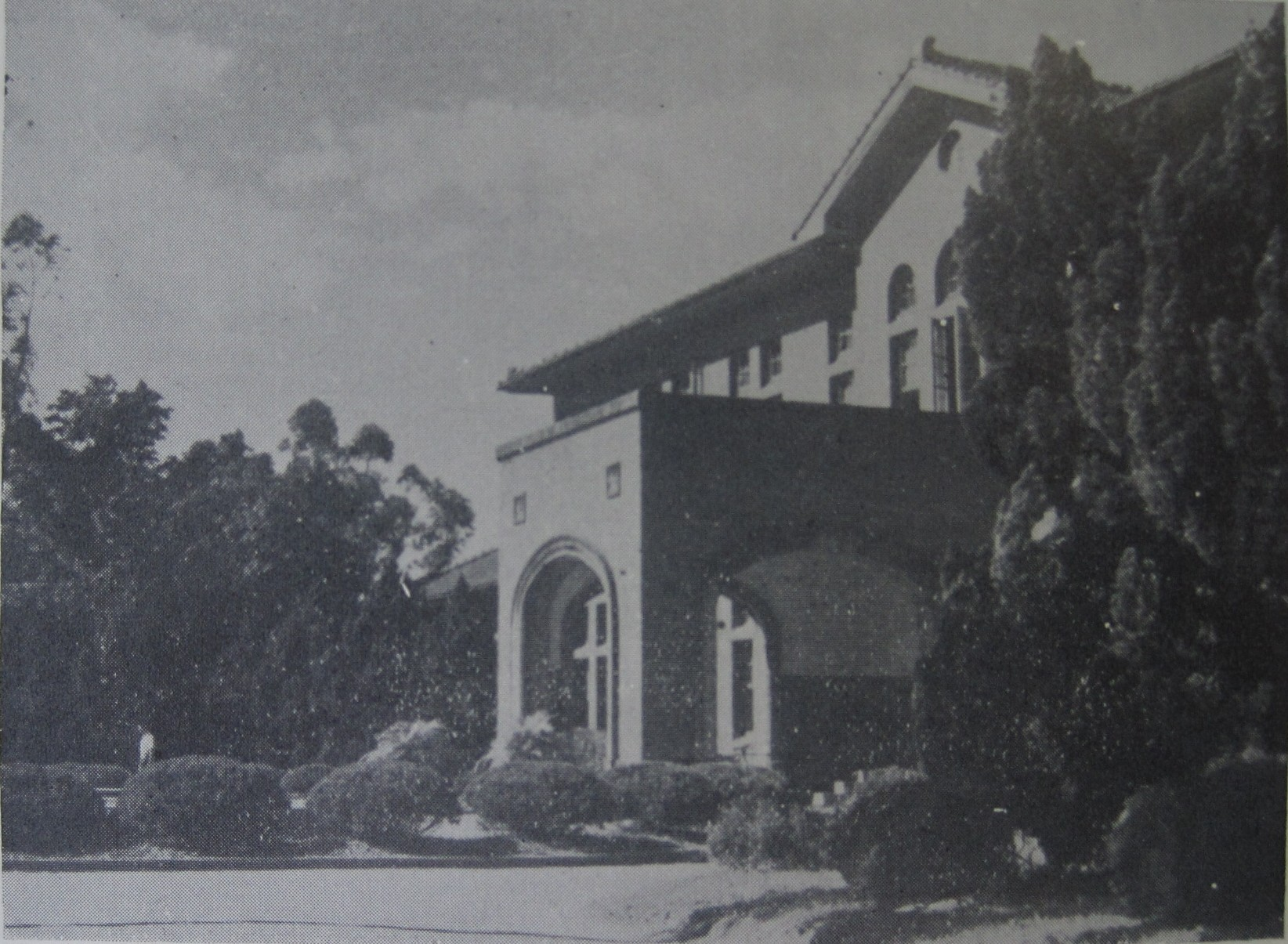 兩翼加蓋前的成大校本部